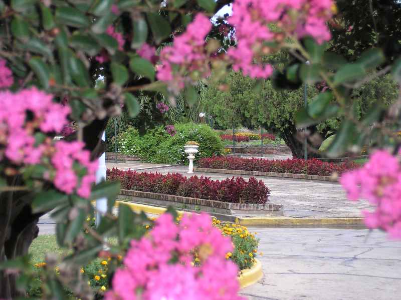 Foto de un ángulo de la plaza de San Vicente, provincia de Santa Fe, Argentina. Tomada por Adrián Staffolani en Febrero de 2007 con una cámara Olympus D 545.